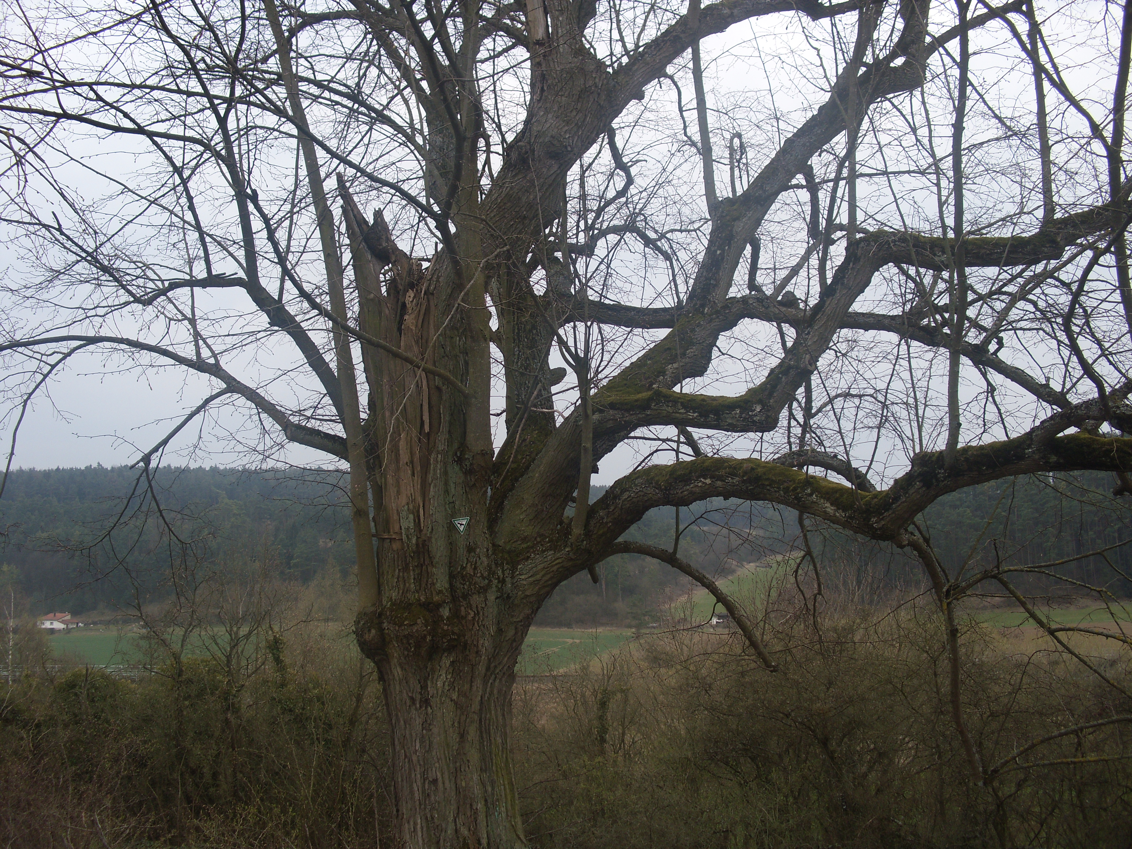 Geschützte Linde hinter Armenseelenkapelle